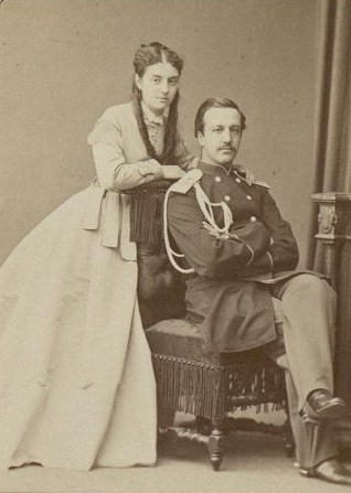 Граф Илларион Иванович Воронцов-Дашков с женой Елизаветой Андреевной, рожд. Шуваловой.